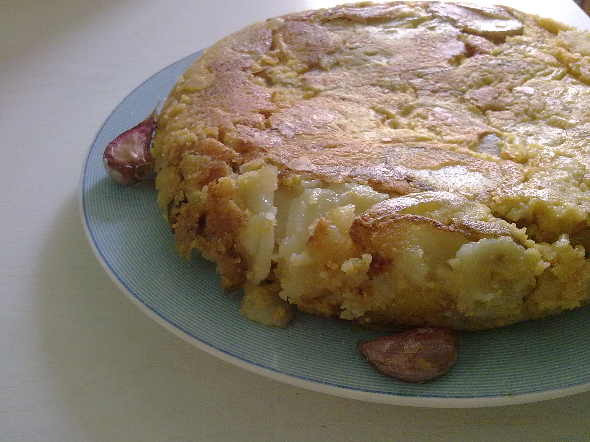 Vegan potato omelette - Tortilla de patata sin huevo (vegan) Baked frozen vegetable sausages and peas